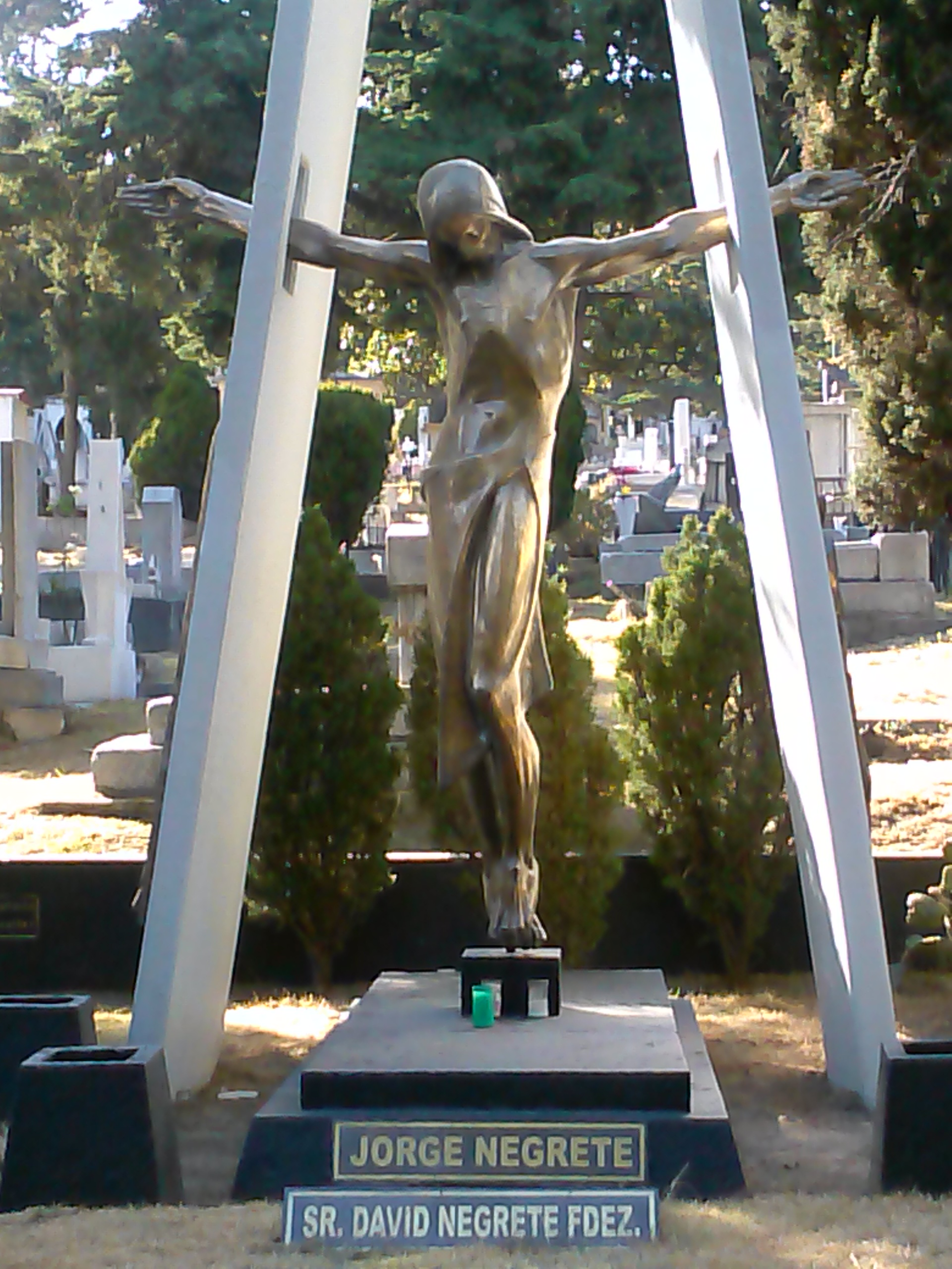 Foto de la tumba de Jorge Negrete